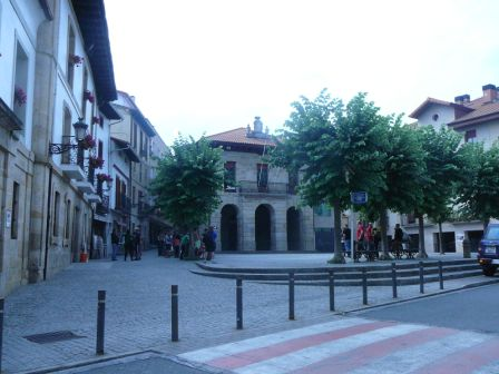 Eskoriatzako udaletxea.